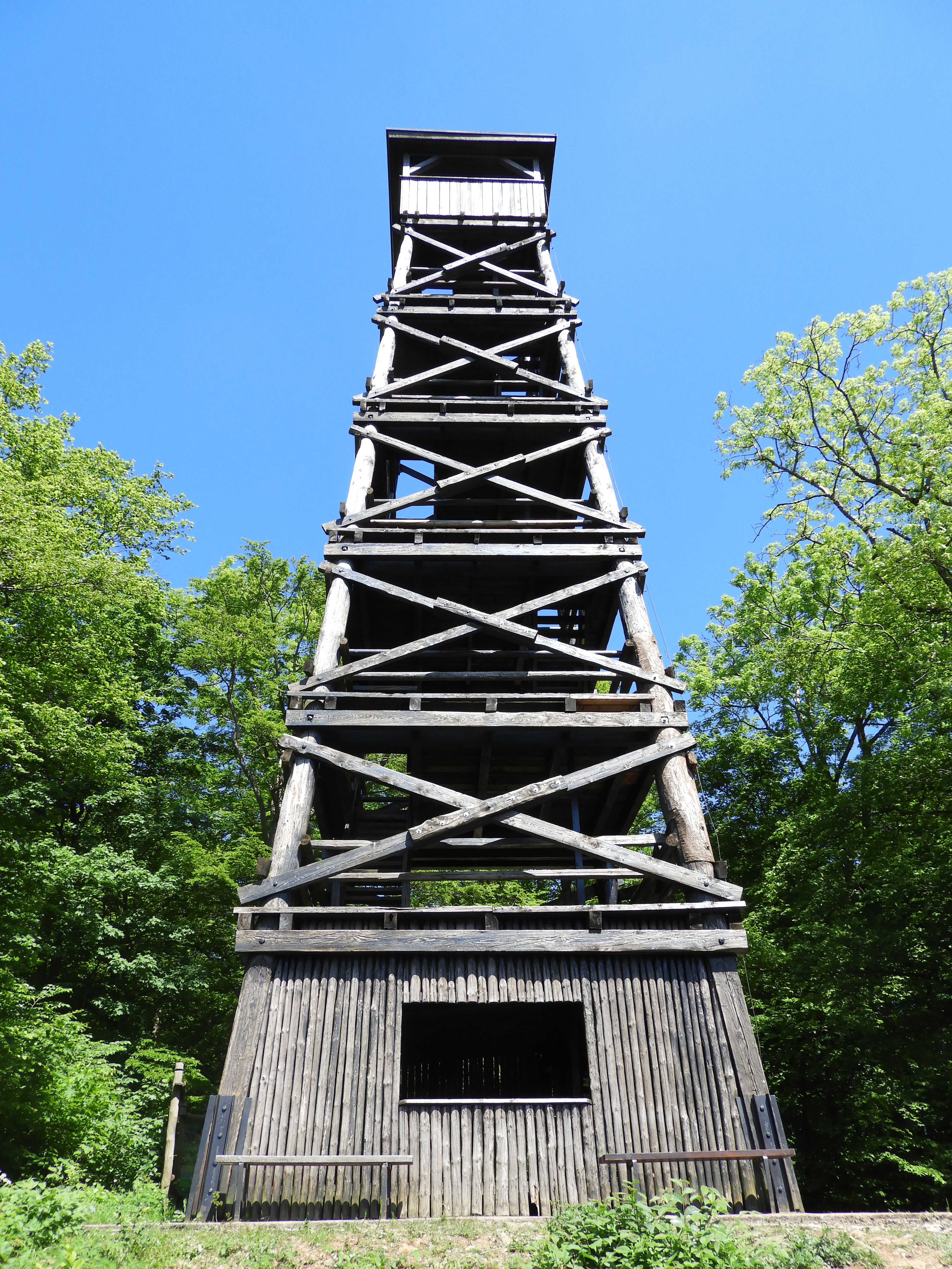 Der im Mai 1964 eingeweihte Plesseturm, mit sechs Etagen und rund 22 m Höhe, wurde auf der Stelle eines in 1884 errichteten Aussichtsturms gebaut, der 1961 wegen Baufälligkeit abgerissen wurde.